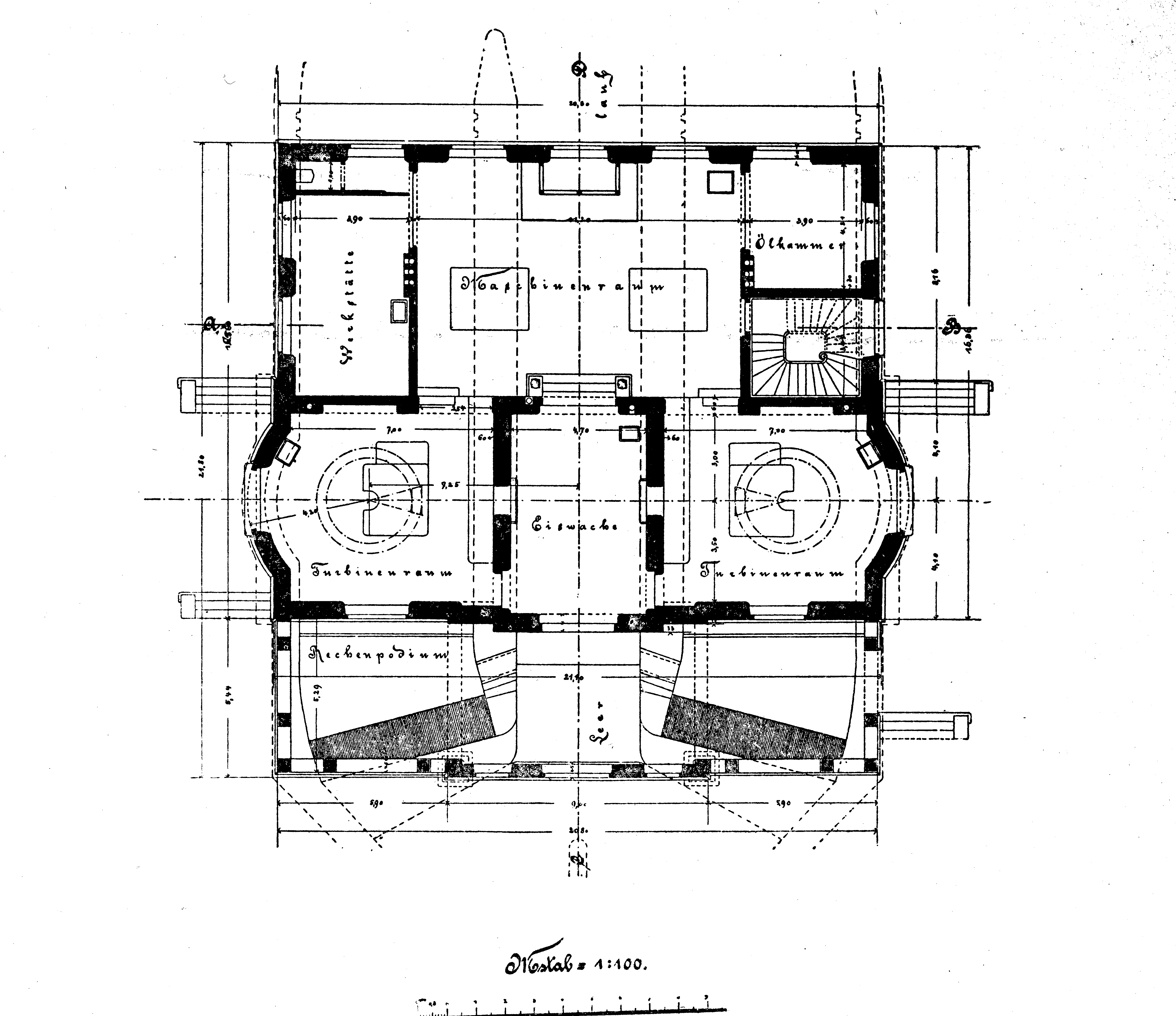 München, Grundriss des Elektrizitätswerks in den Maximiliananlagen.